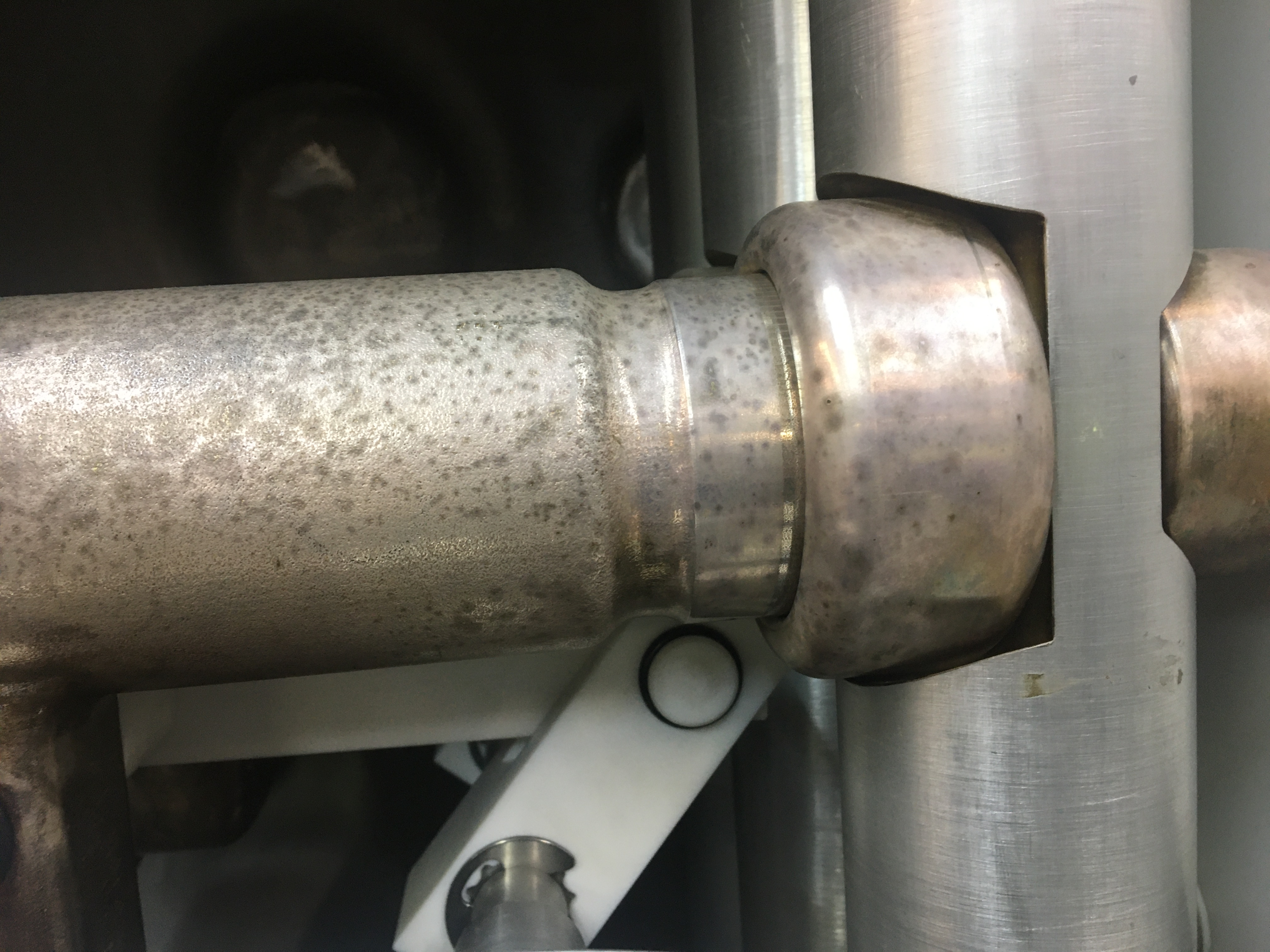 Sectionneur fermé 63 kV de grande puissance